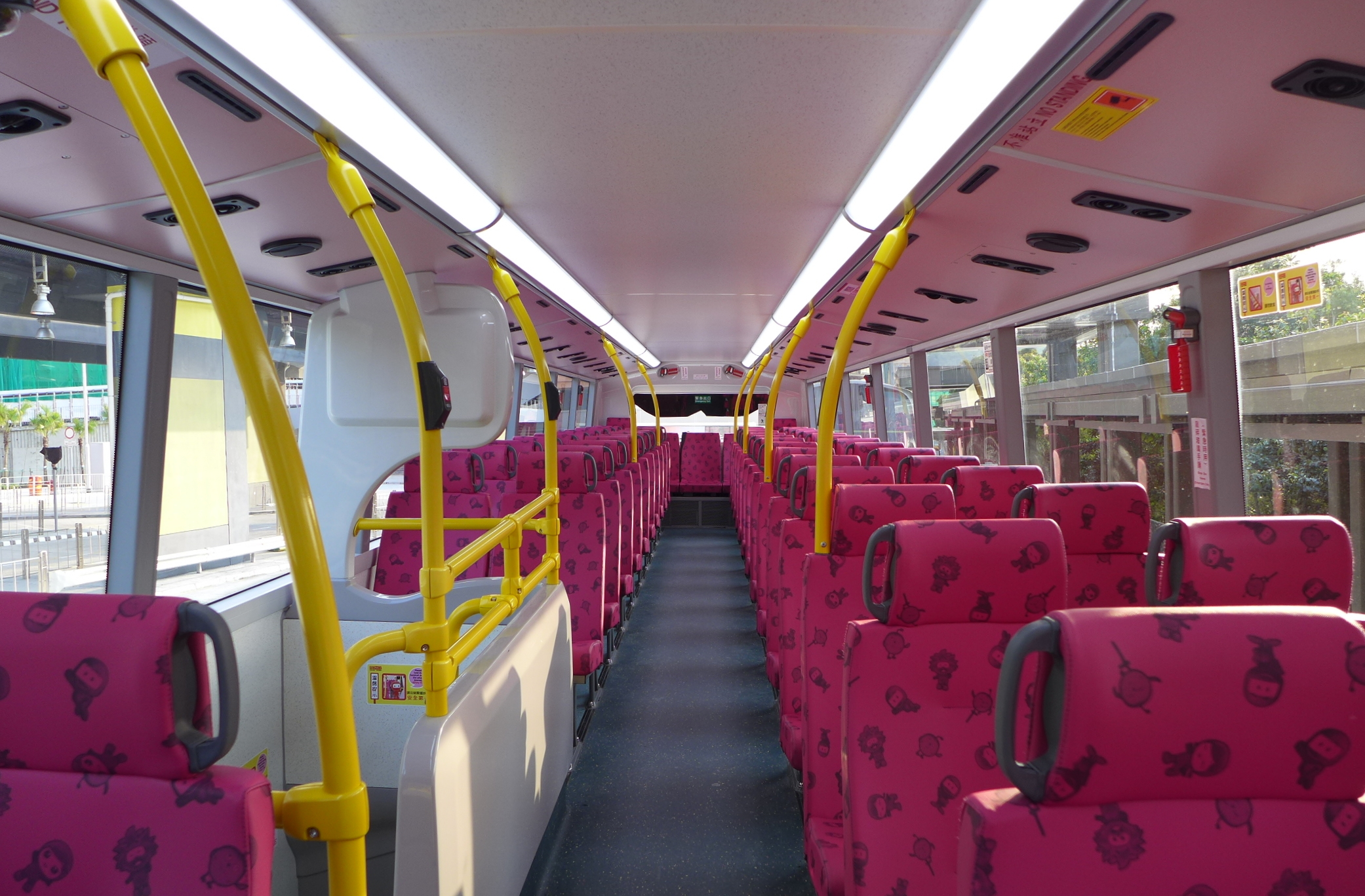 KMB ATENU Enviro 500 MMC Interior